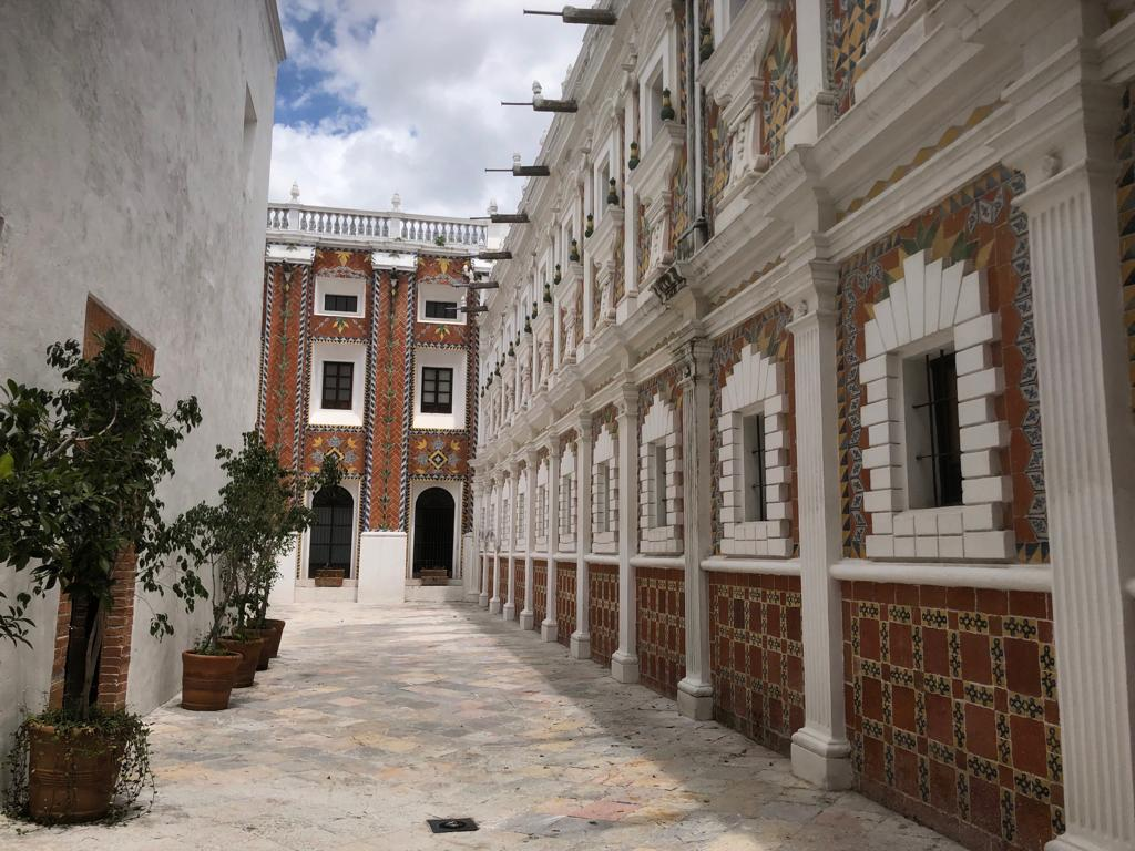 Vista del interior del Patio de los Azulejos